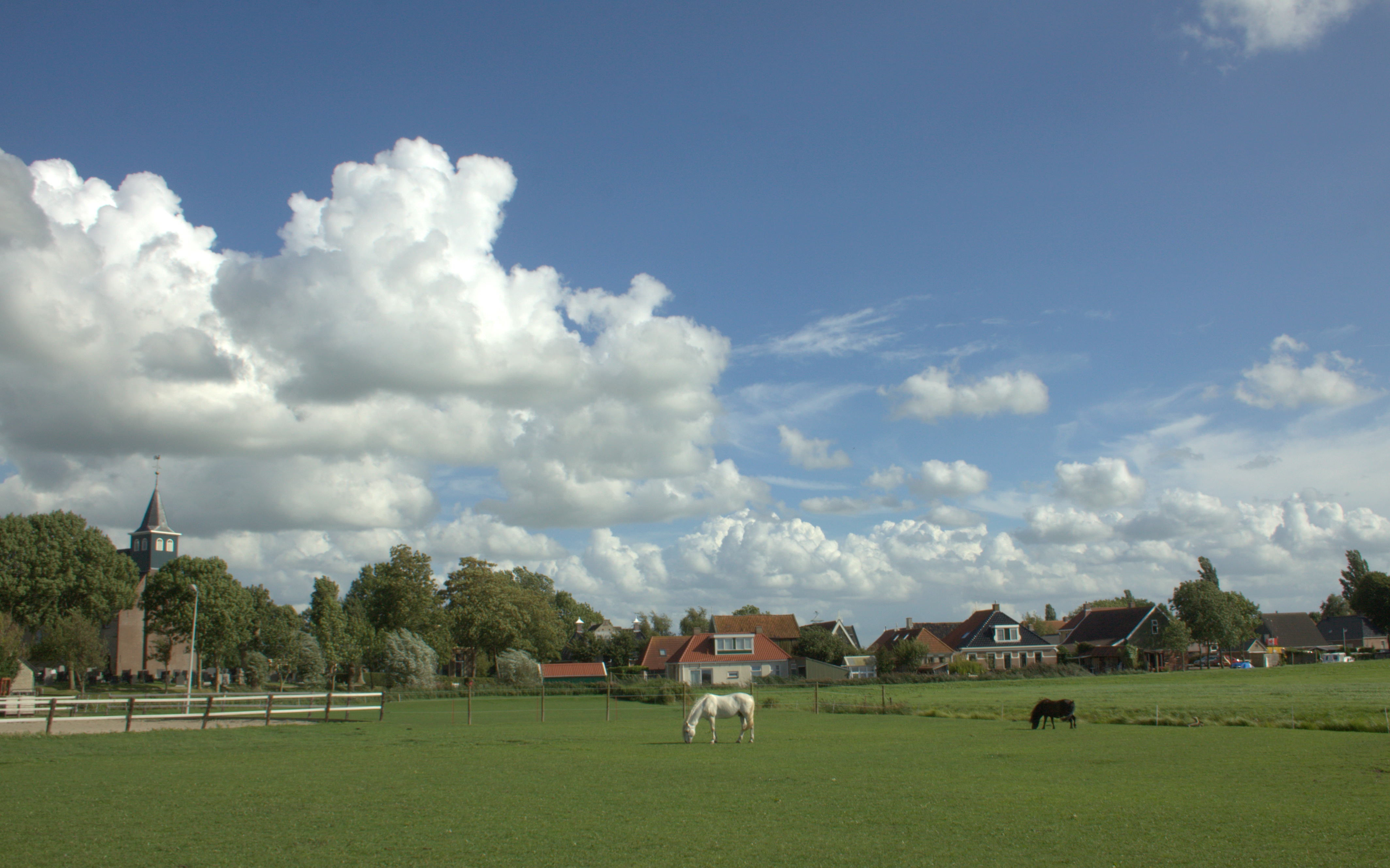 Wjelsryp, een terpdorp in Friesland.